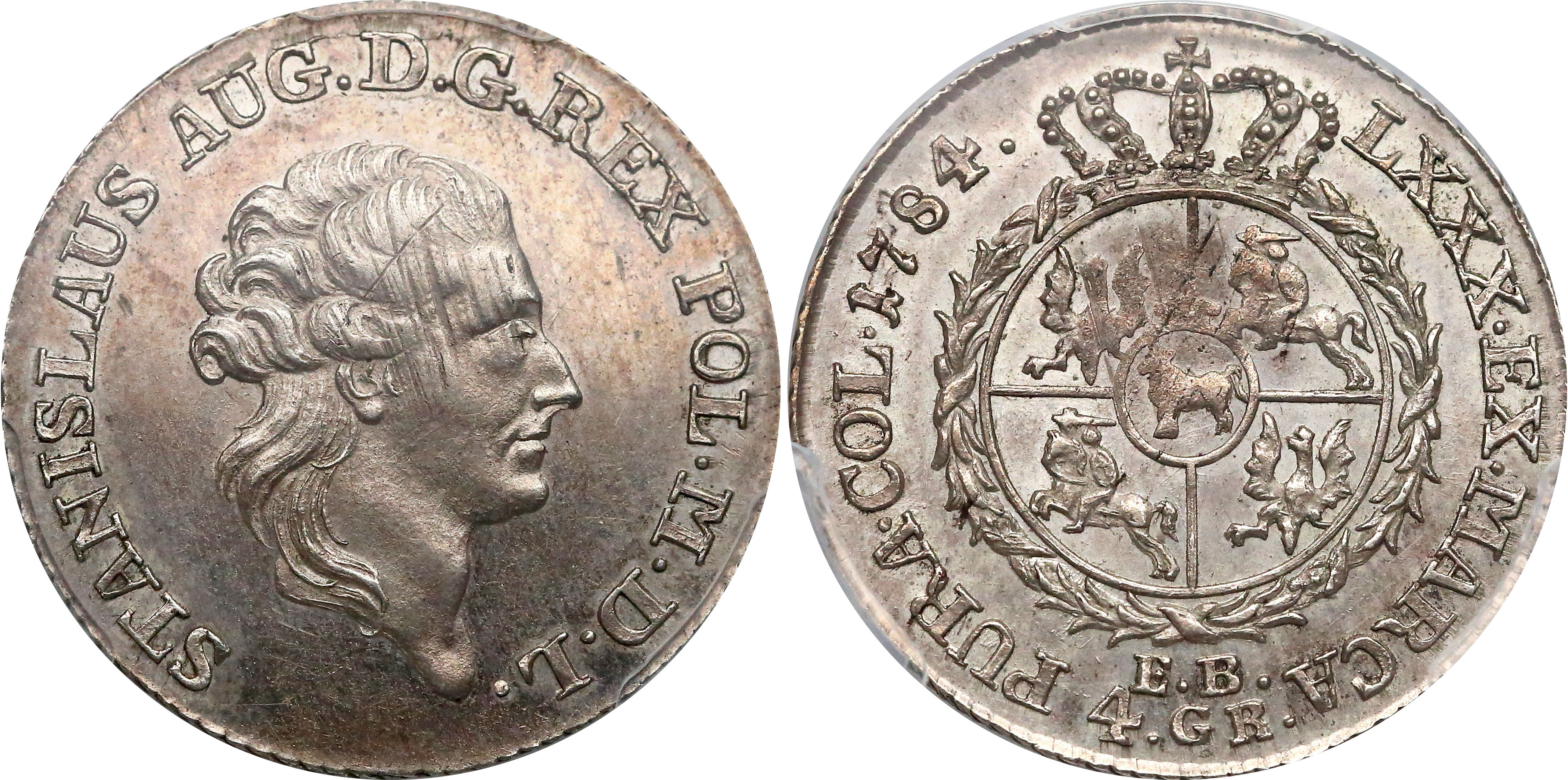 Złotówka koronna 1784